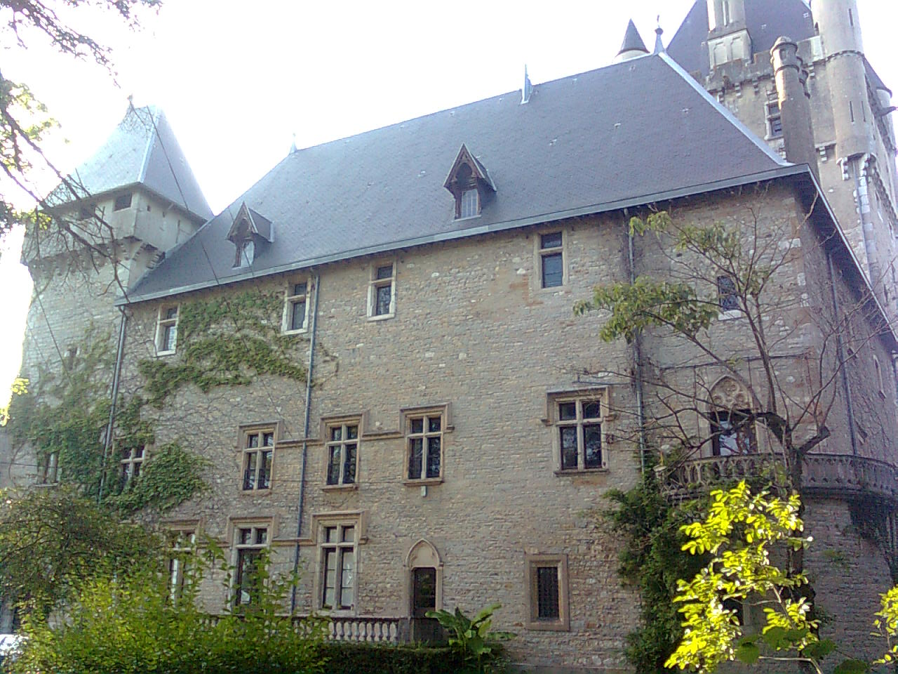 Château de Chazey-sur-Ain, (Inscrit, 1987) .